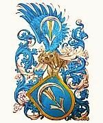 Wappen des Adelsgeschlechts der Meyer zum Pfeil (Baseler Patrizier) (Variante): In Blau mit goldenem Schildbord über gestürztem golden geschäfteten silbernen Pfeil sinkender (= gestürzter) silberner Mond. Wappen der Familie seit ca. 14./15. Jh.